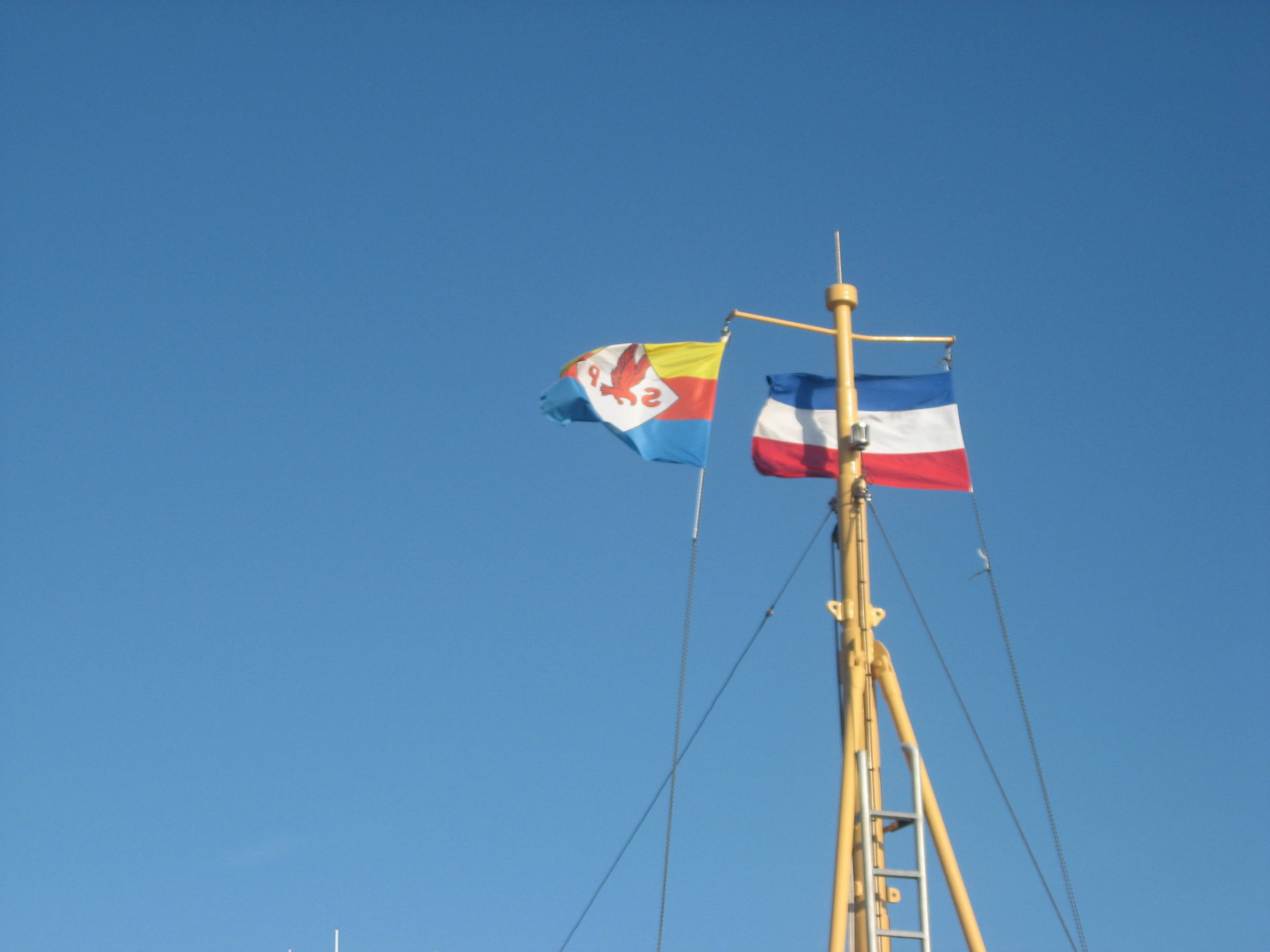 Flagge der Adler-Reederei am Mast der Rosa Paluka